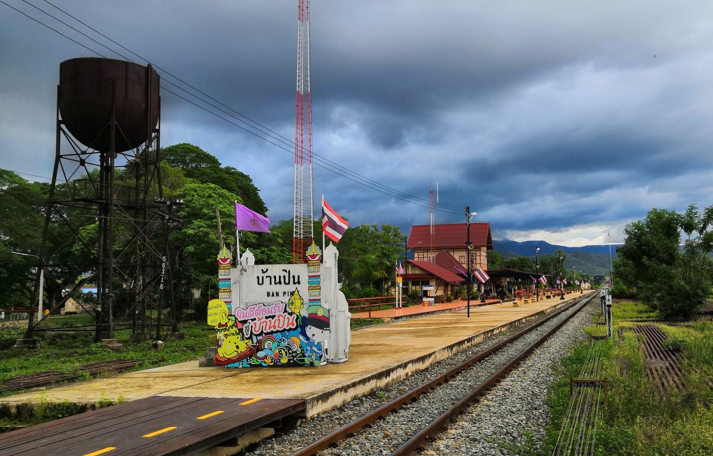 ป้ายทางทิศใต้ กับหอเติมน้ำ